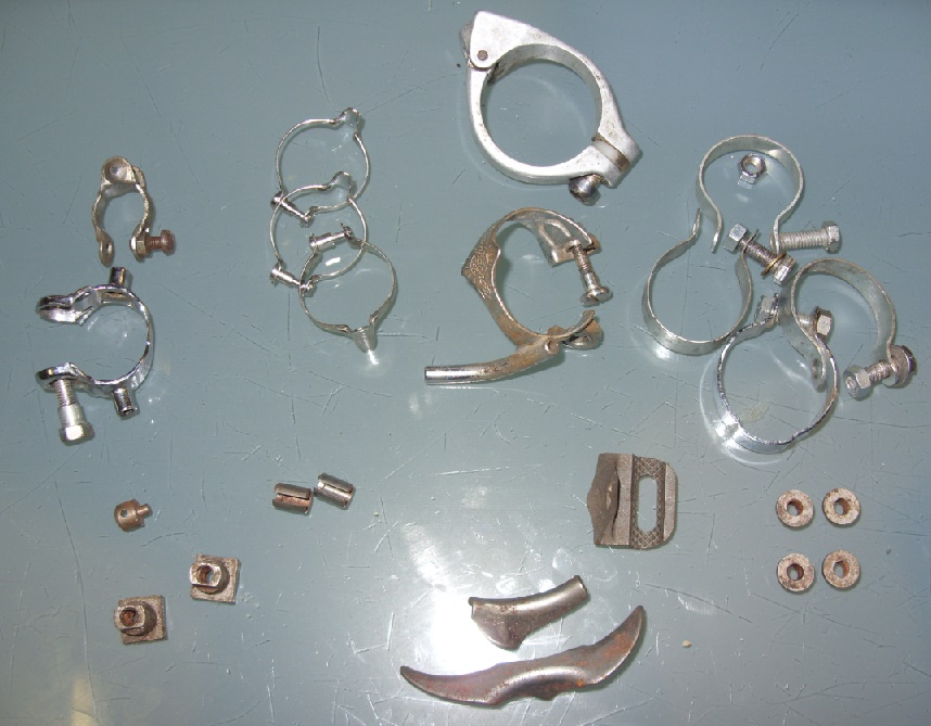 De klembanden (boven 125gr. ) worden vervangen door Braze-ons (onder 45gr.)